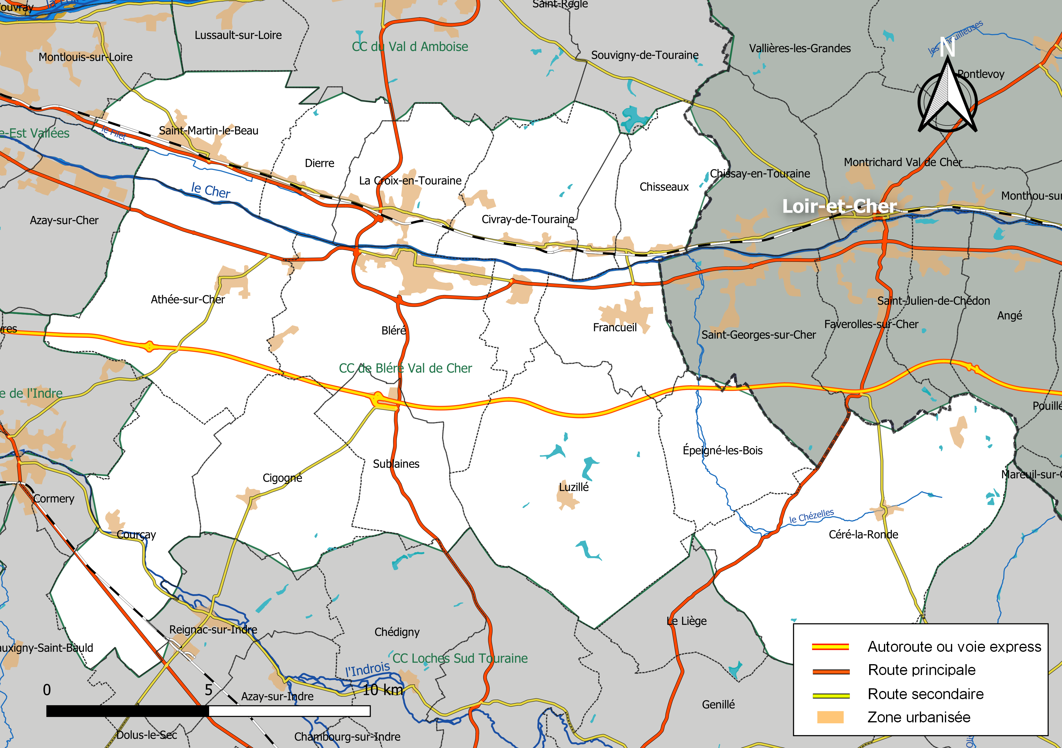 Carte de la communauté de communes de Bléré Val de Cher, département d'Indre-et-Loire, France. Composition au 1er janvier 2019.